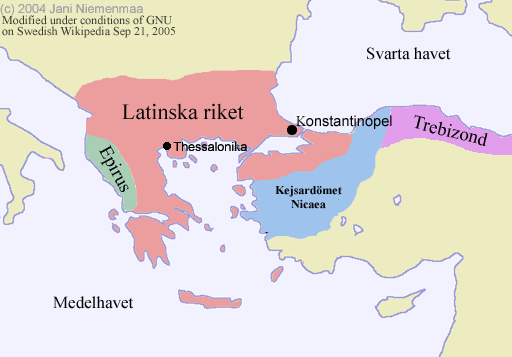 Bild från Commons med samma namn. Texten översatt till svenska i enlighet med reglerna för GNU. Korr av tidigare version.